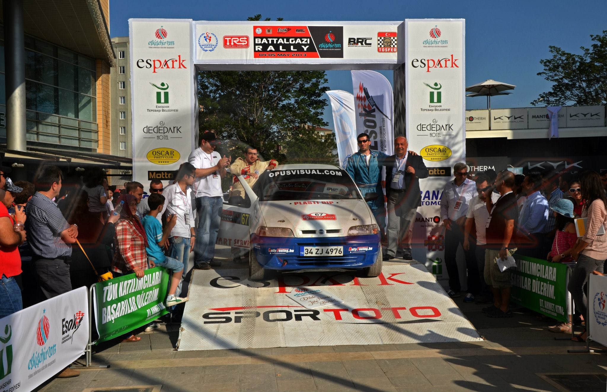 Eskişehir Ralli 2013.